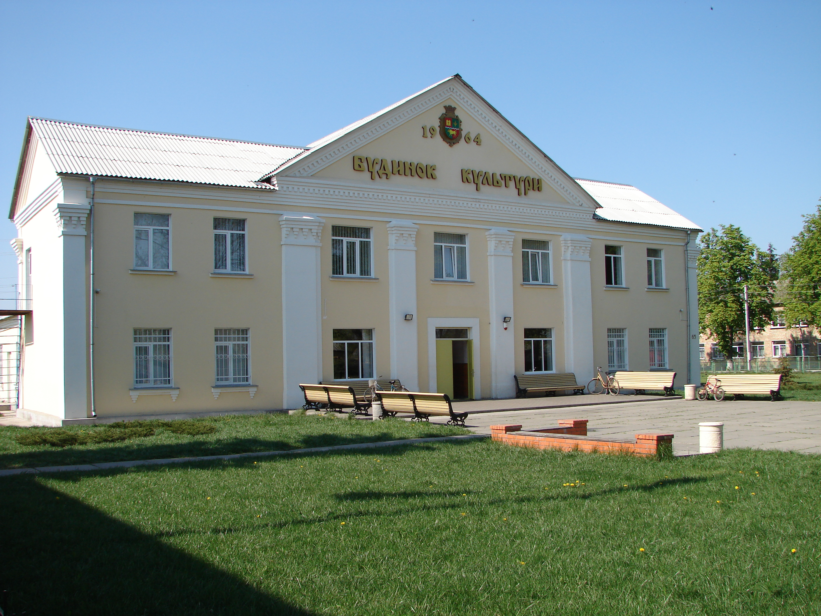 Літки. Будинок культури